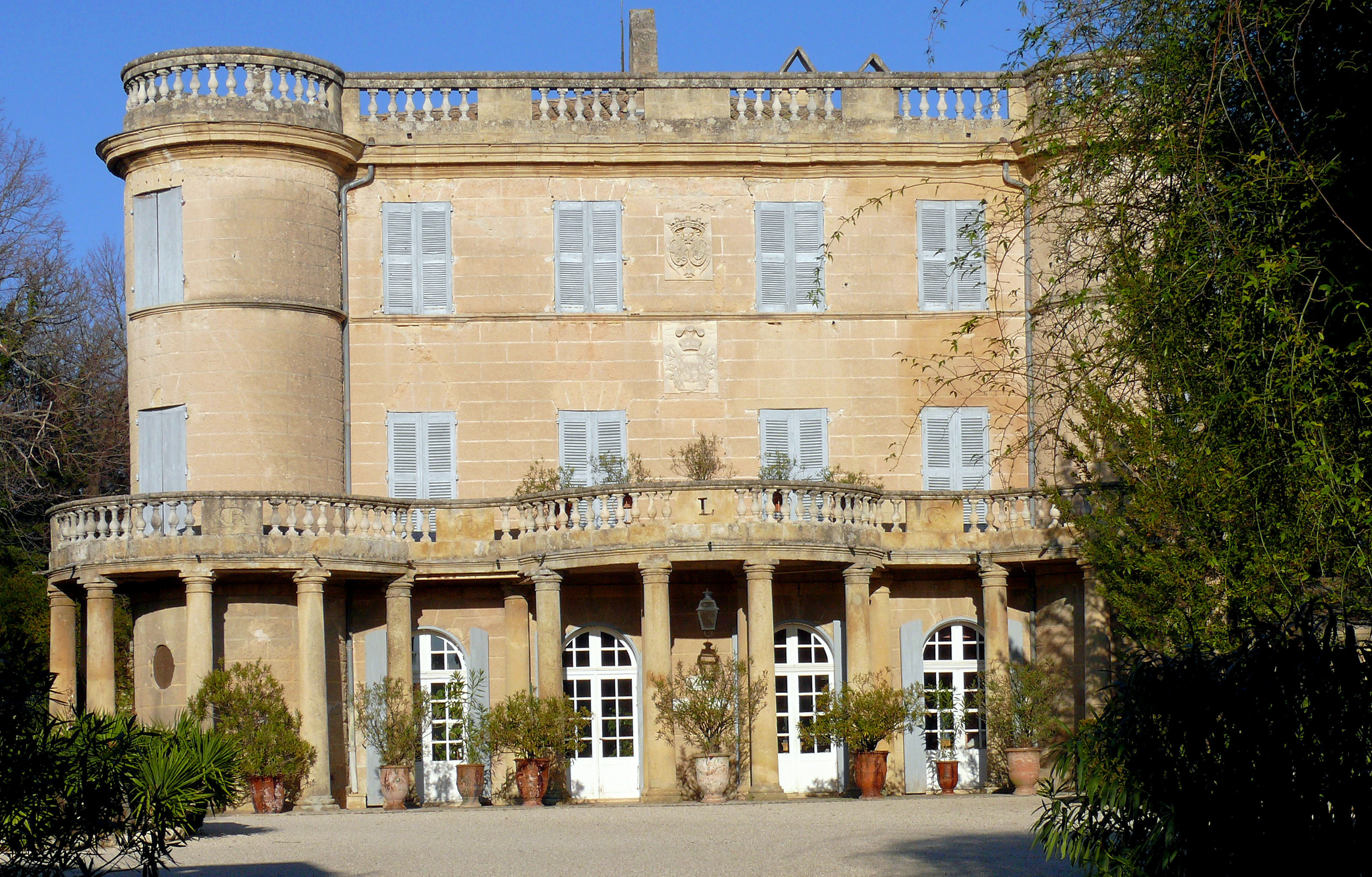 Argilliers - Château de Castille